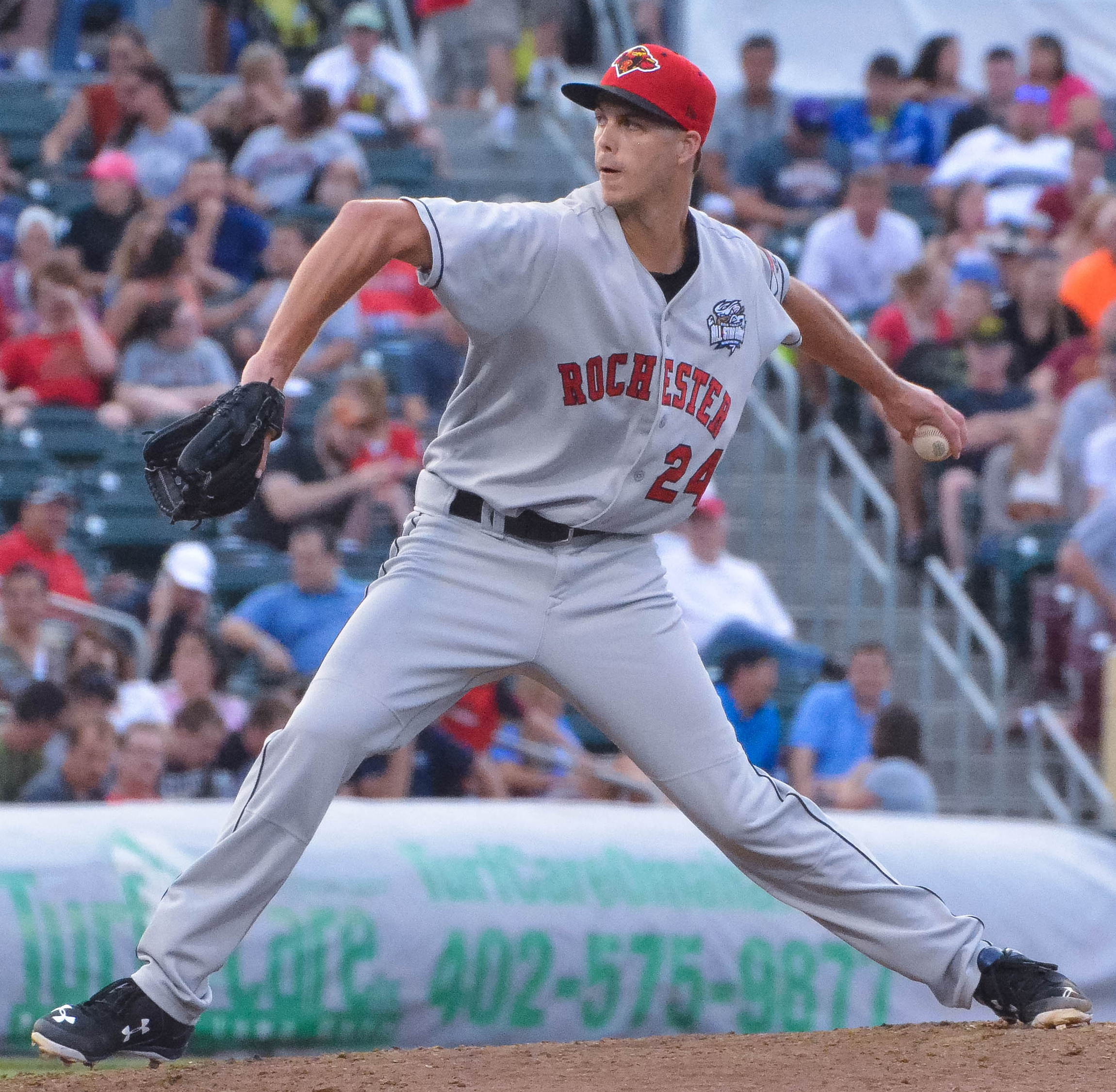 Taylor Rogers